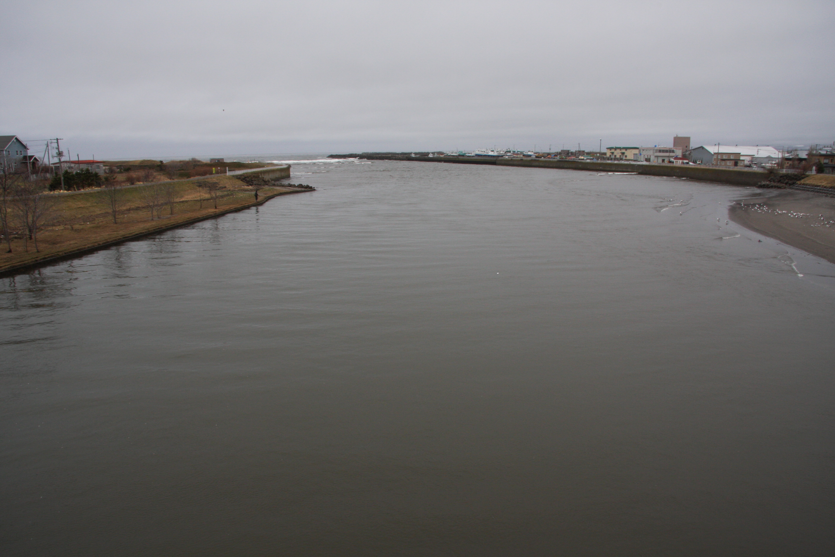 斜里川 斜里橋より下流